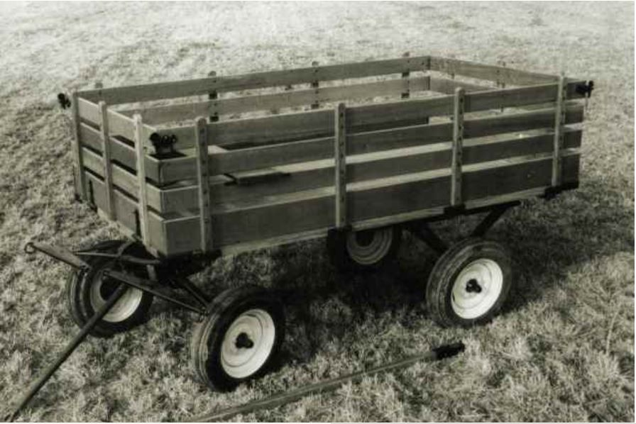 Acoplado agrario de tractor IAME Pampa